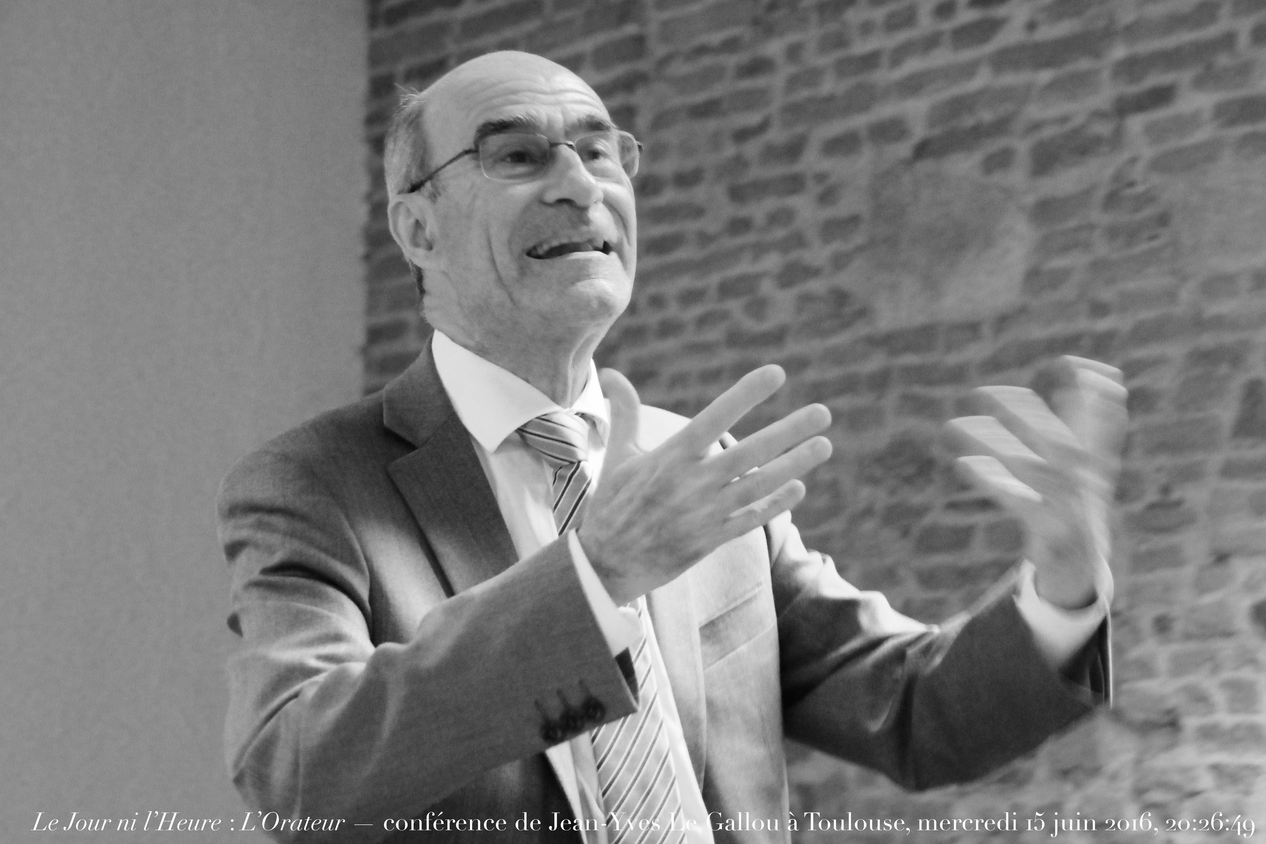 Le Jour ni l’Heure 9539 - L’Orateur — Jean-Yves Le Gallou, né en 1948, durant sa conférence à Toulouse, “L‘immigration la catasrophe”, mercredi 15 juin 2016